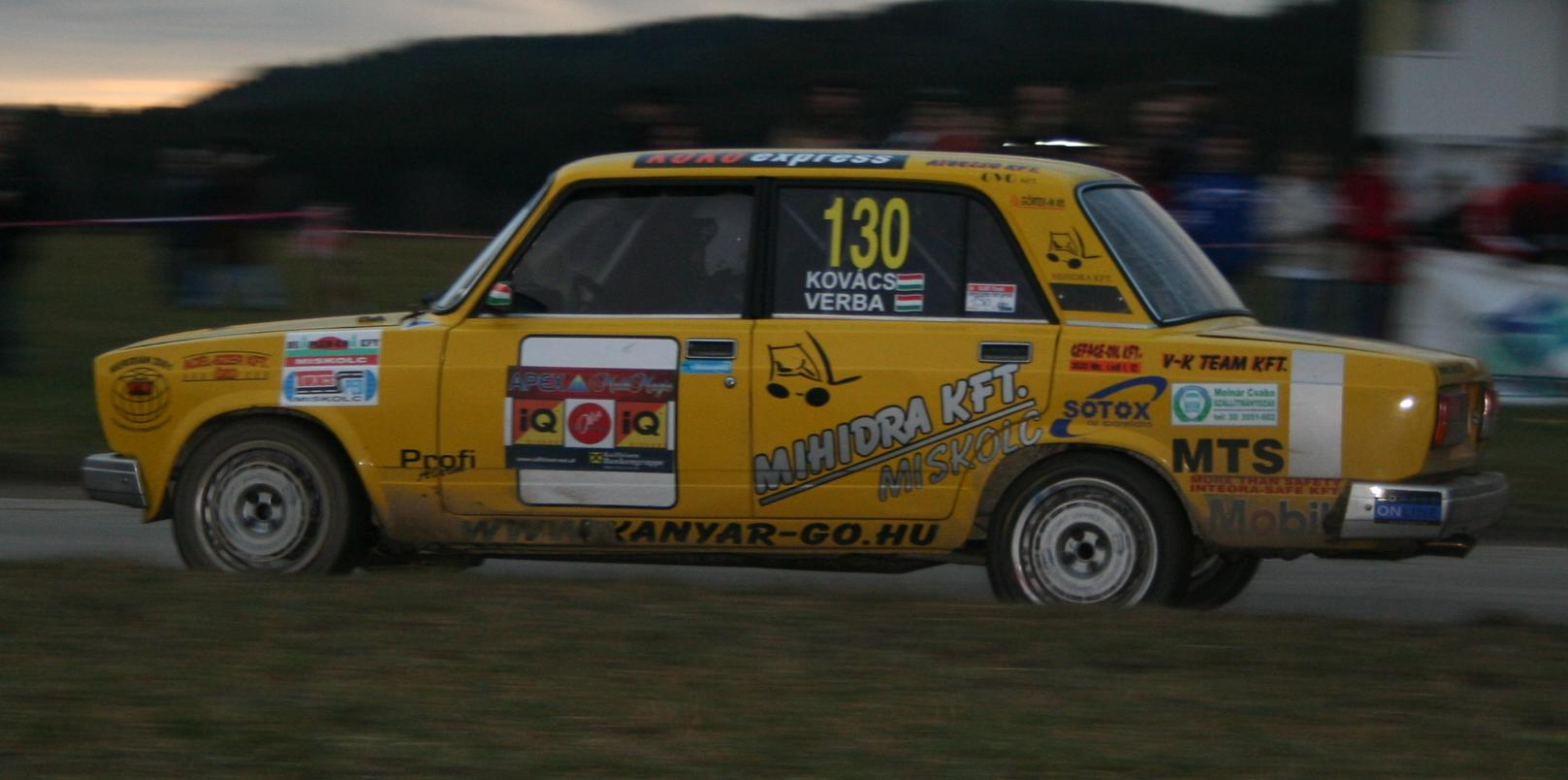 Kovacs Zoltan auf einem Lada 2107 bei der IQ Jännerrallye 2007 (SP 17 / Trölsberg)